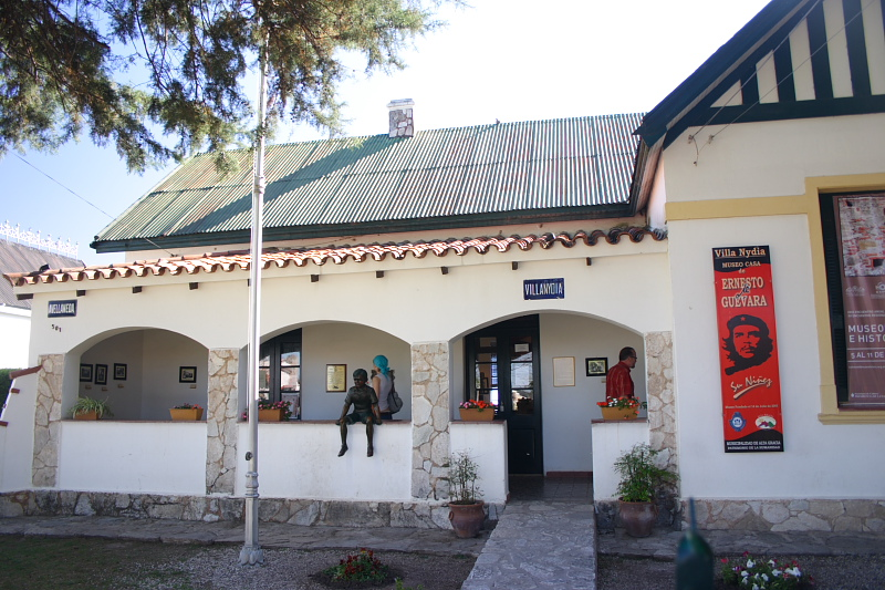 Casa del Che Guevara en Alta Gracia. Che Guevara's home in Alta Gracia, Córdoba, Argentina.